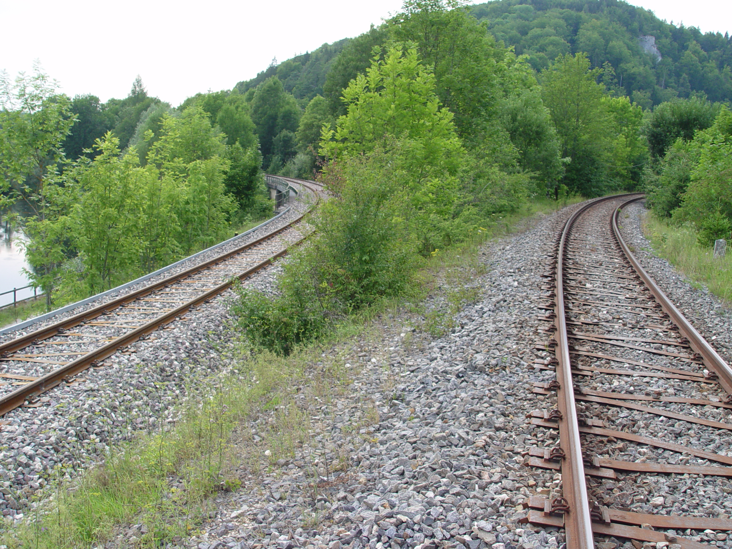 Trennung der Donautalbahn (links) und der Zollernalbbahn (rechts) ins Schmeiental, westlich von Inzigkofen, Baden-Württemberg. Links im Bild die Donau.